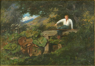 Le pêcheur